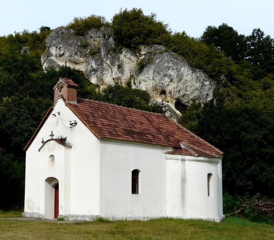 Crkva u Lukovu